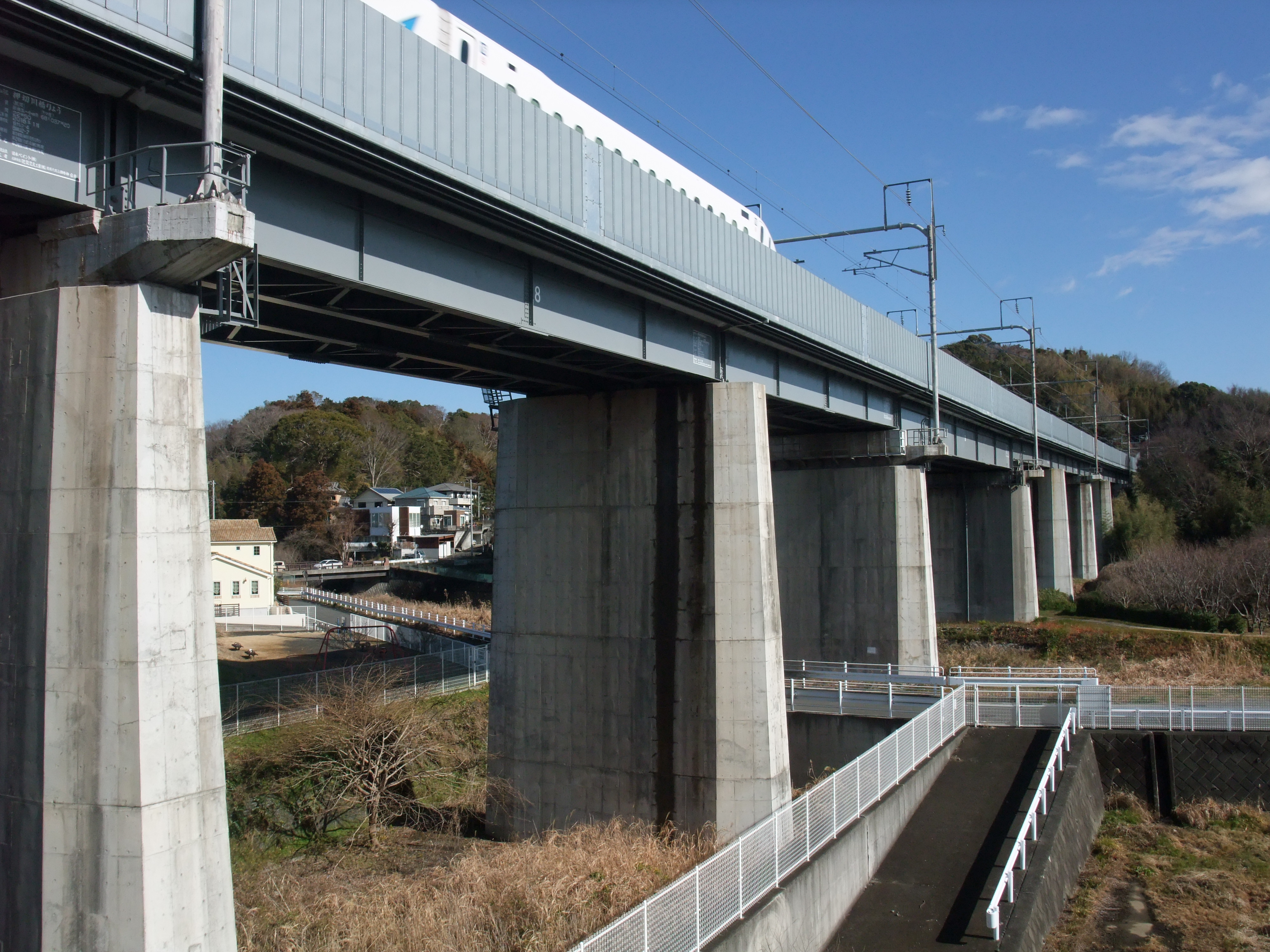 東海道新幹線中村川橋梁（小田原市)。なお中村川はこの橋梁の下流から押切川と名前が変わるため、橋梁にも押切川橋梁の副称がある。